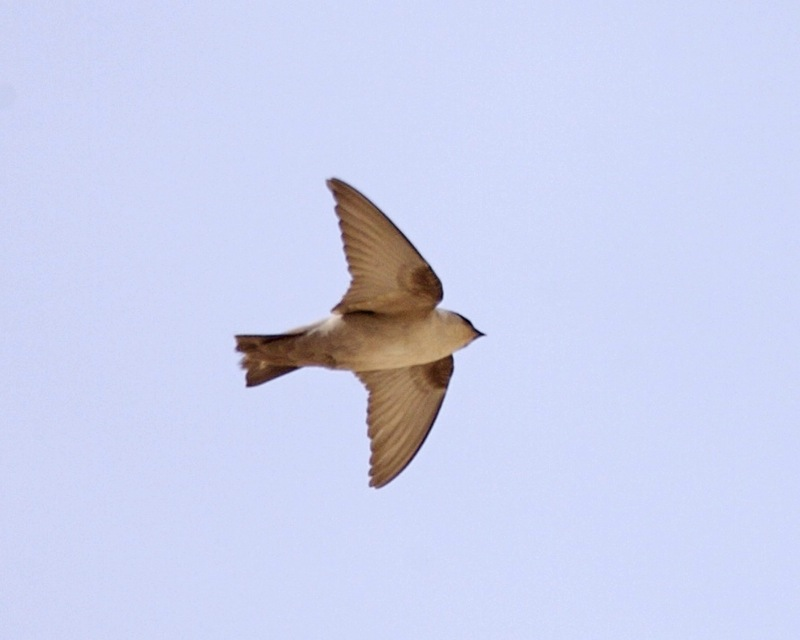 Pale Crag Martin Ptyonoprogne obsoleta, Cairo, Egypt